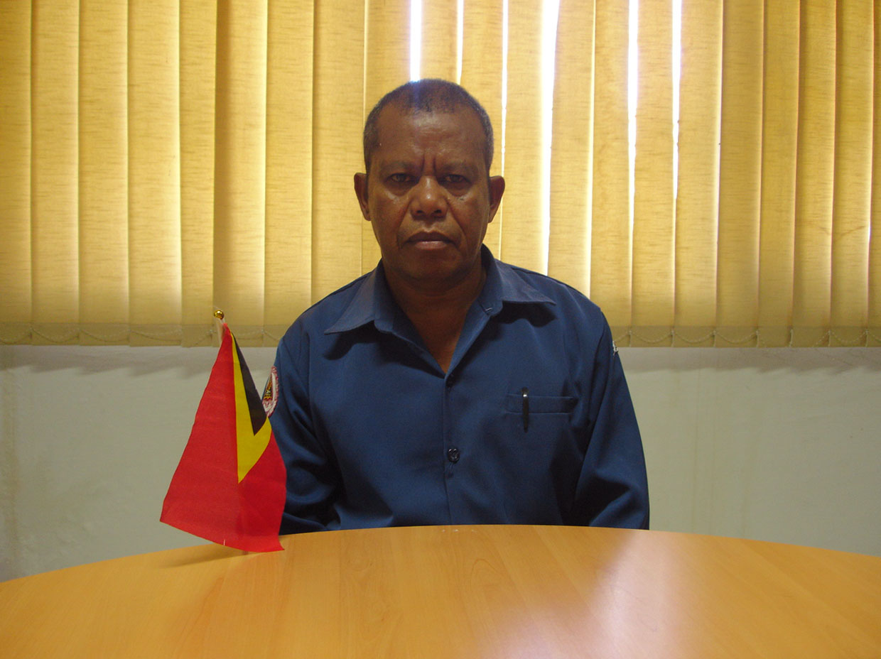 Americo Soares, Administrator des Subdistrikts Letefoho